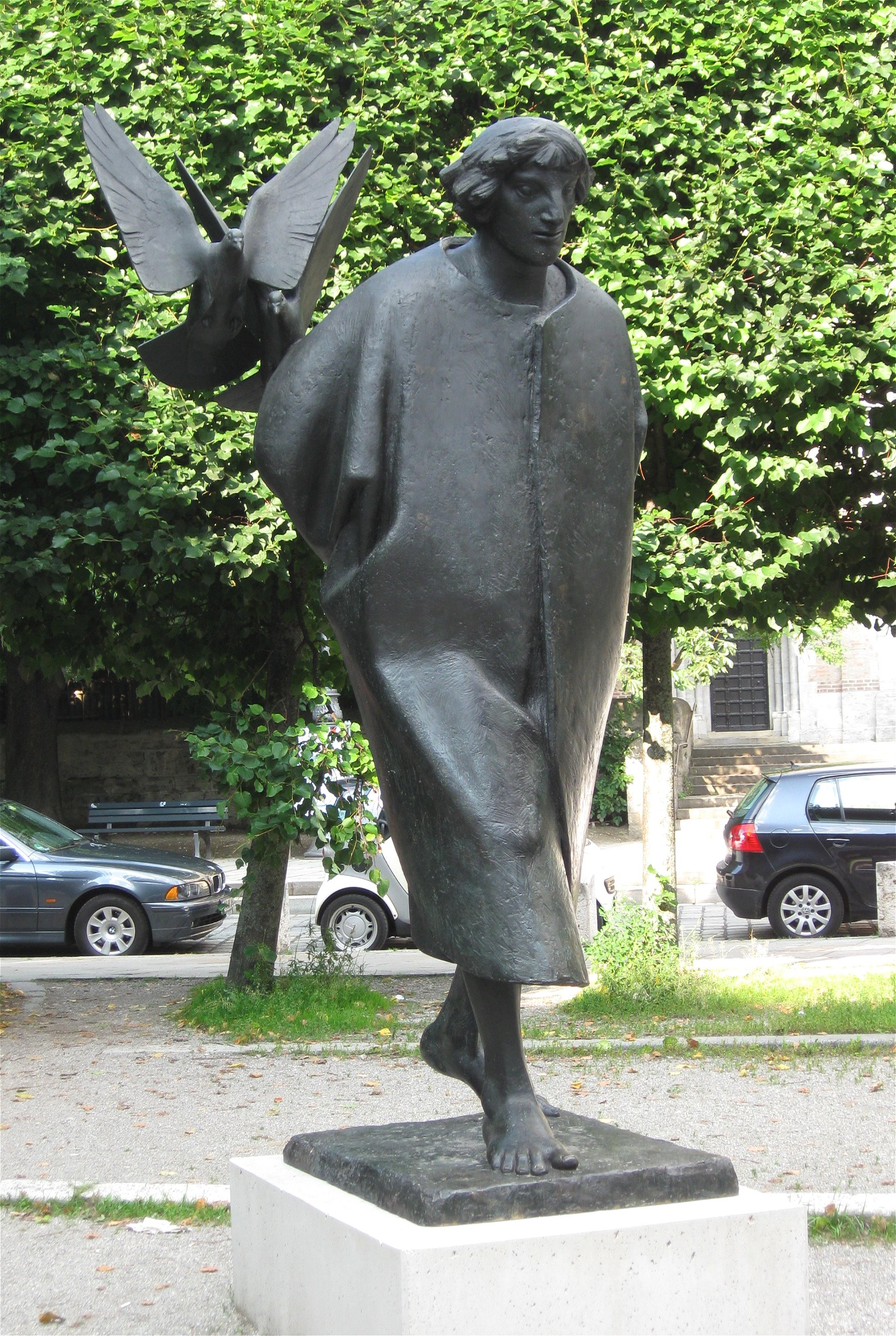 Martin Mayer: Franzikus 1978/79, Bronze, St.-Anna-Platz, München